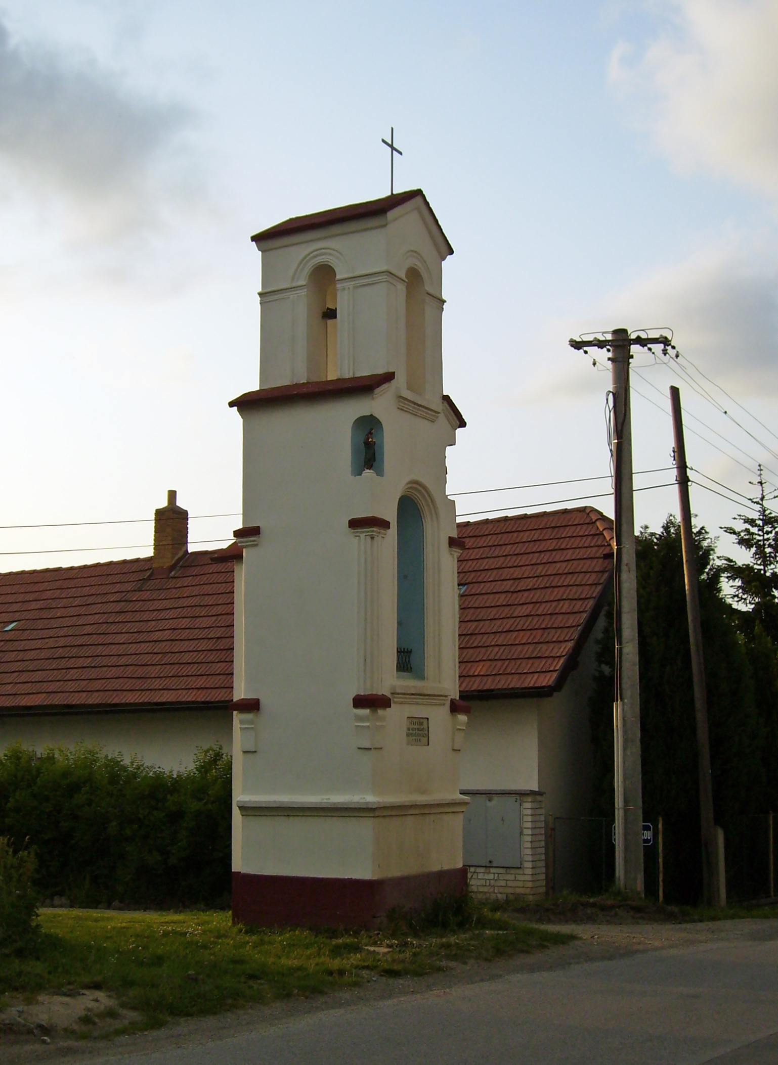 Kaplička v Horoušánkách.